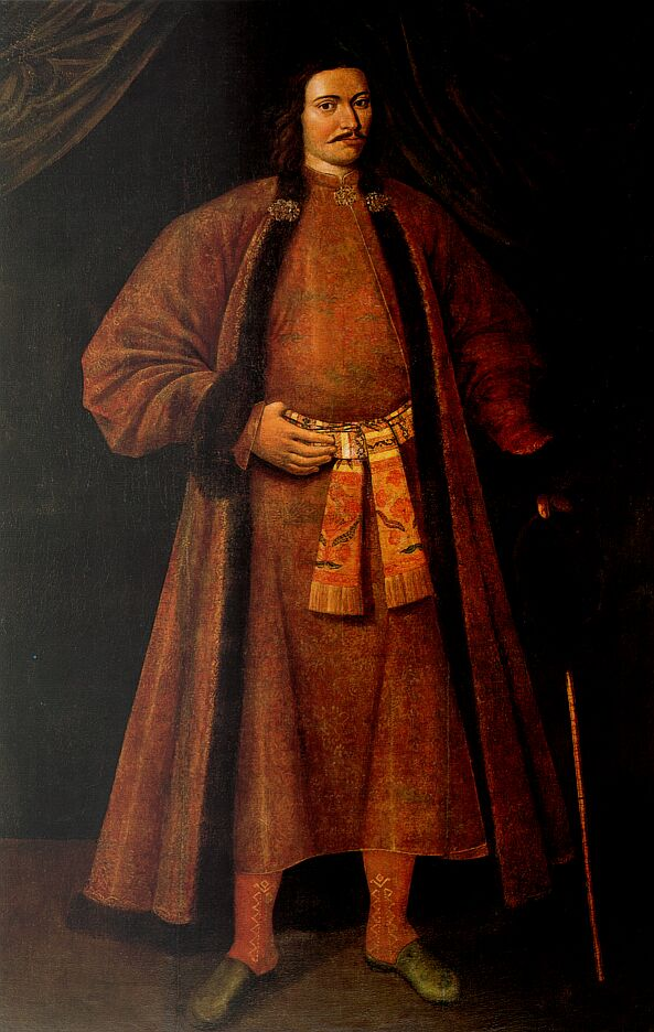 Лев Кириллович Нарышкин. Парсуна, 17 век. ГИМ. Холст, масло. 204х133. Происходит из имения графов Уваровых Поречье Можайского уезда, ранее - подмосковная усадьба Петровское-Разумовское.